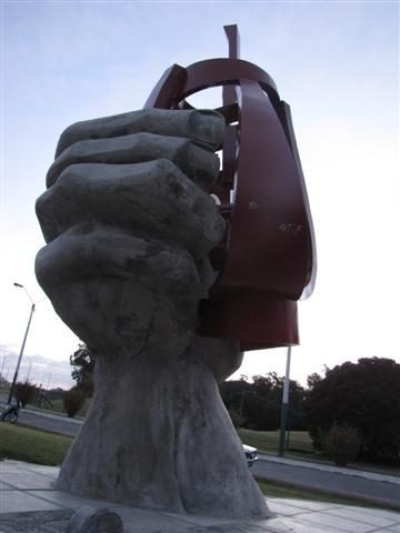 Monumento al Mate, escultura forjada en hierro y hormigón por el arquitecto y escultor Gonzalo Mesa. Ubicada en el Parque Rodó del departamento de San José, Uruguay.